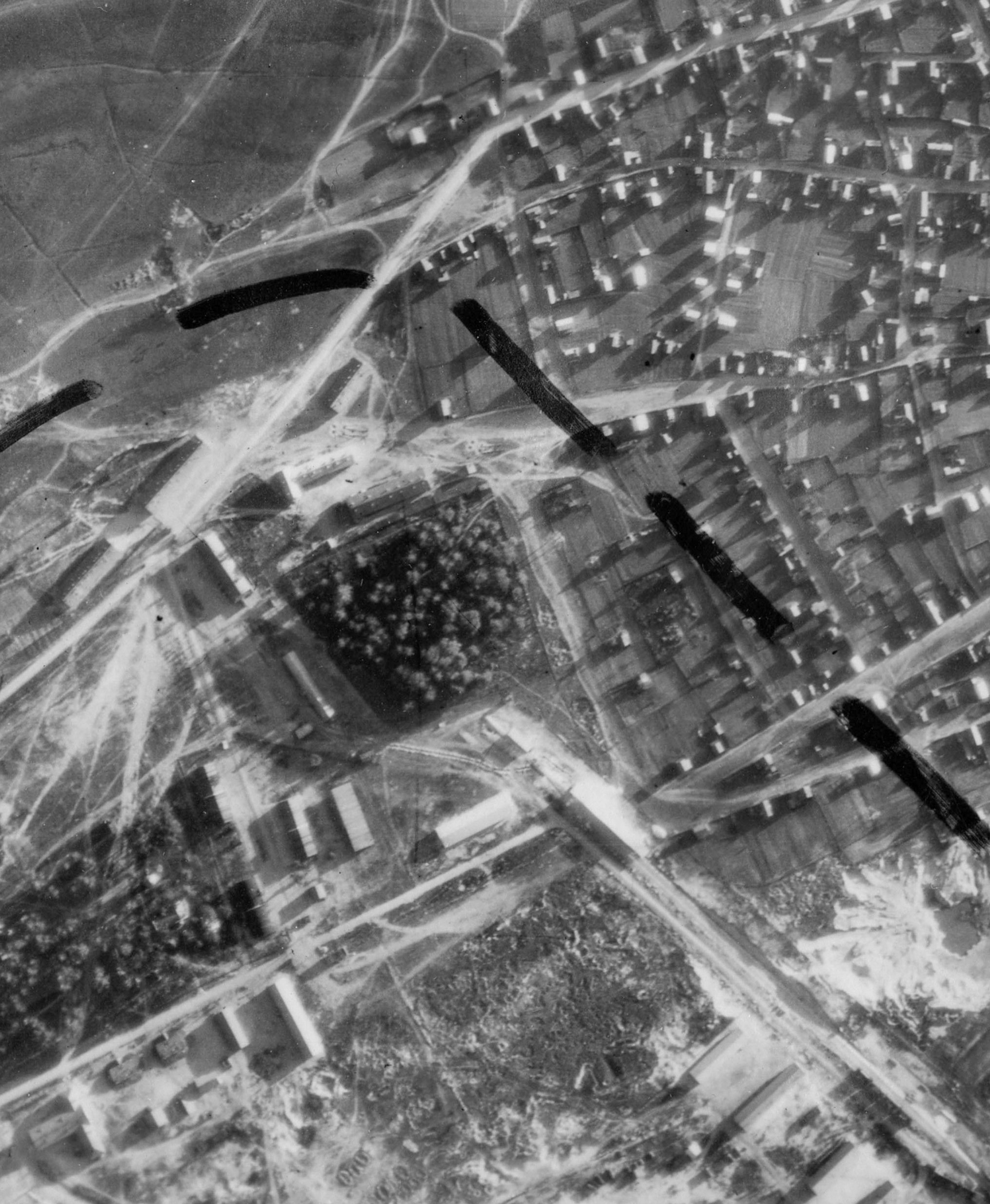 Магілёў. Нямецкі аэрафотаздымак